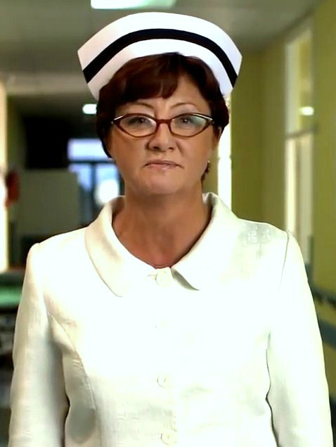 Dorota Gardias, pielęgniarka i działaczka związkowa.